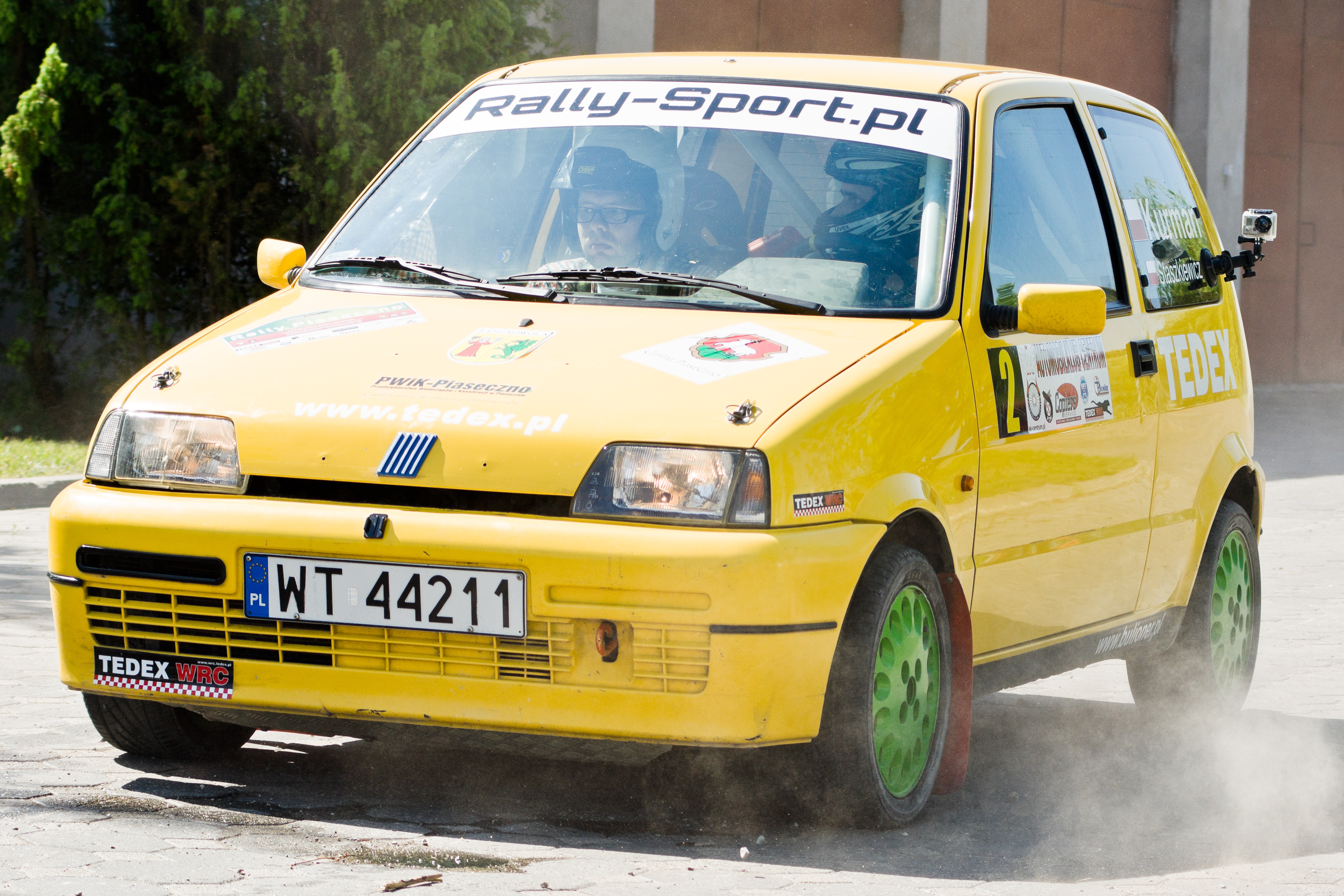 Wyścig VII Rally Piaseczno 2012, OS Gąski, Fiat Cinquecento, nr startowy 2, kierowca Łukasz Kurman, pilot Przemysław Staszkiewicz.